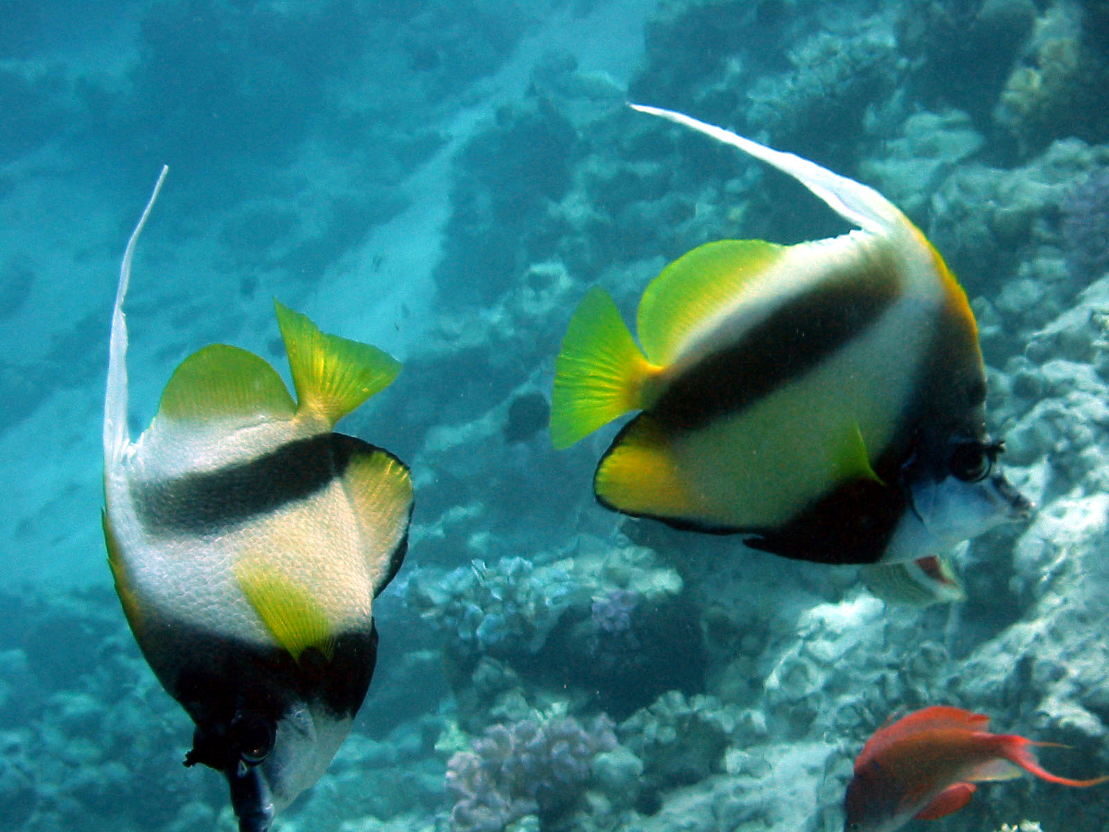 Red sea bannerfish dahab